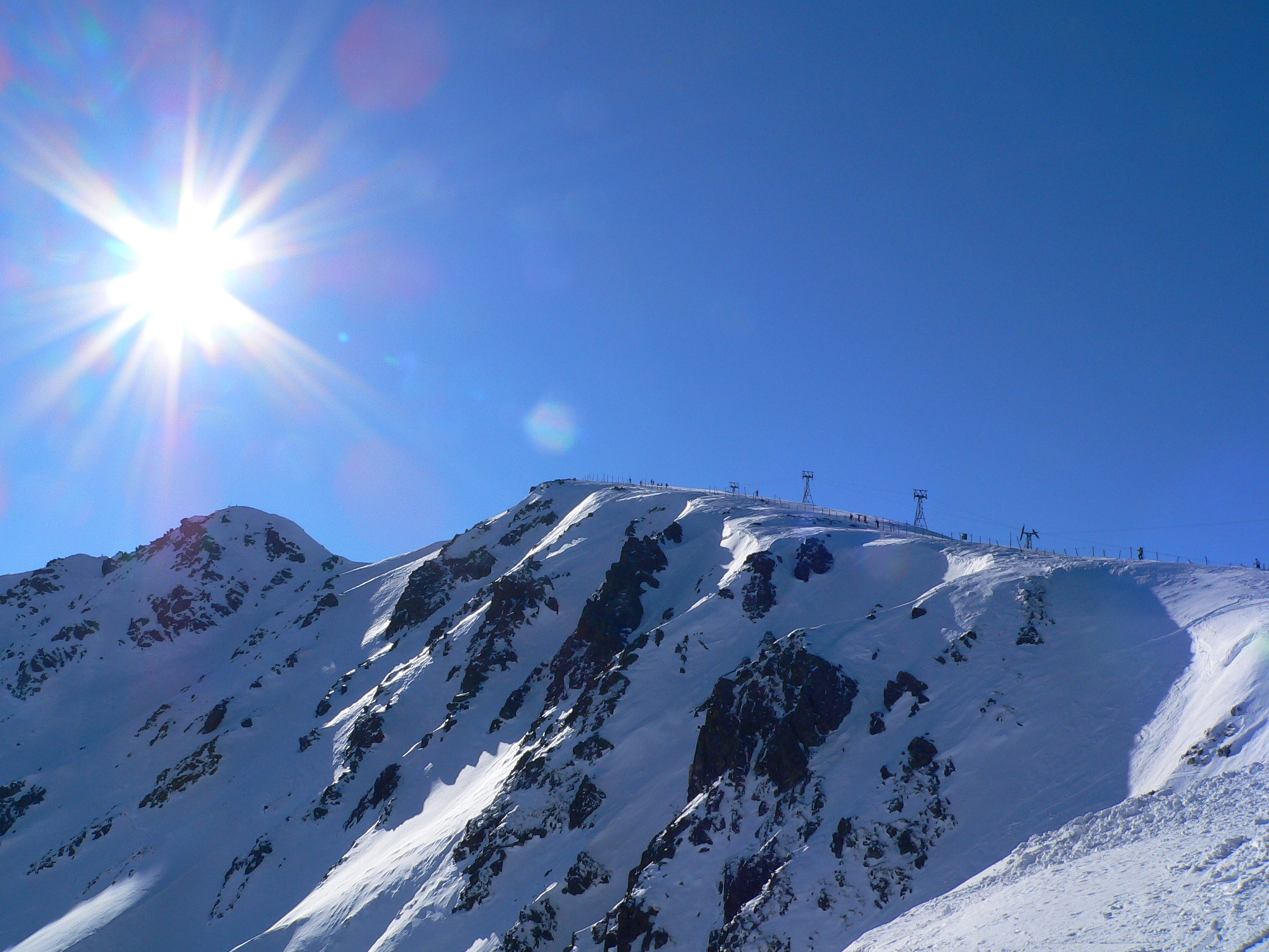 Pohled na horu Chopok (2024m)/Nízké Tatry v zimě